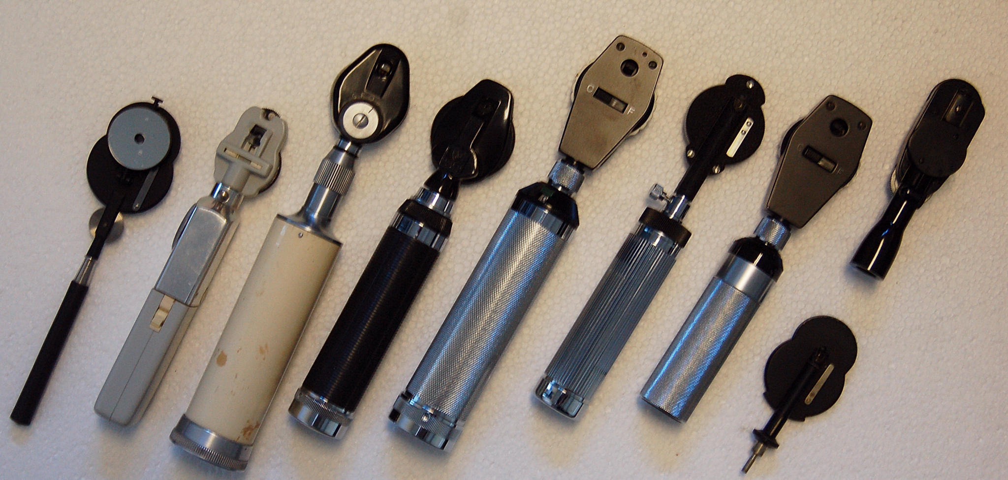 9 st oftalmoskop framsida den sida som patienten ser, Fabrikaten är från vänster till höger, äldre namlöst utan elbelysning, Oculus, Bausch & Lomb, AOC, Heine Miroflex 2, Riester, Heine, Gowllands. carl Zeiss Jena.